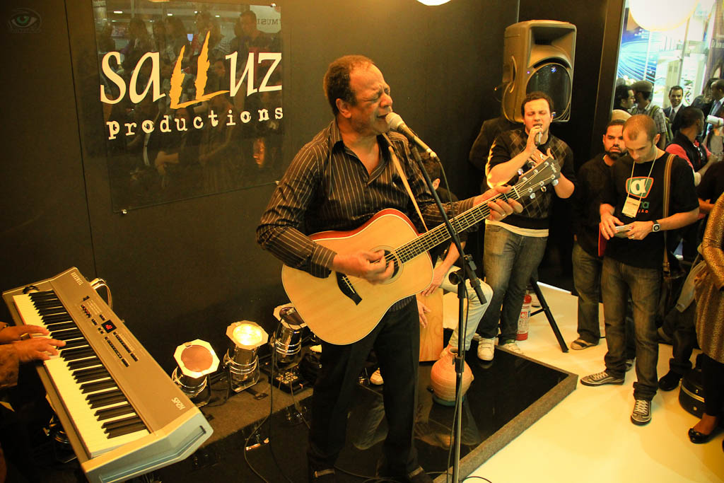 Adhemar de Campos em 2010 na expo cristã